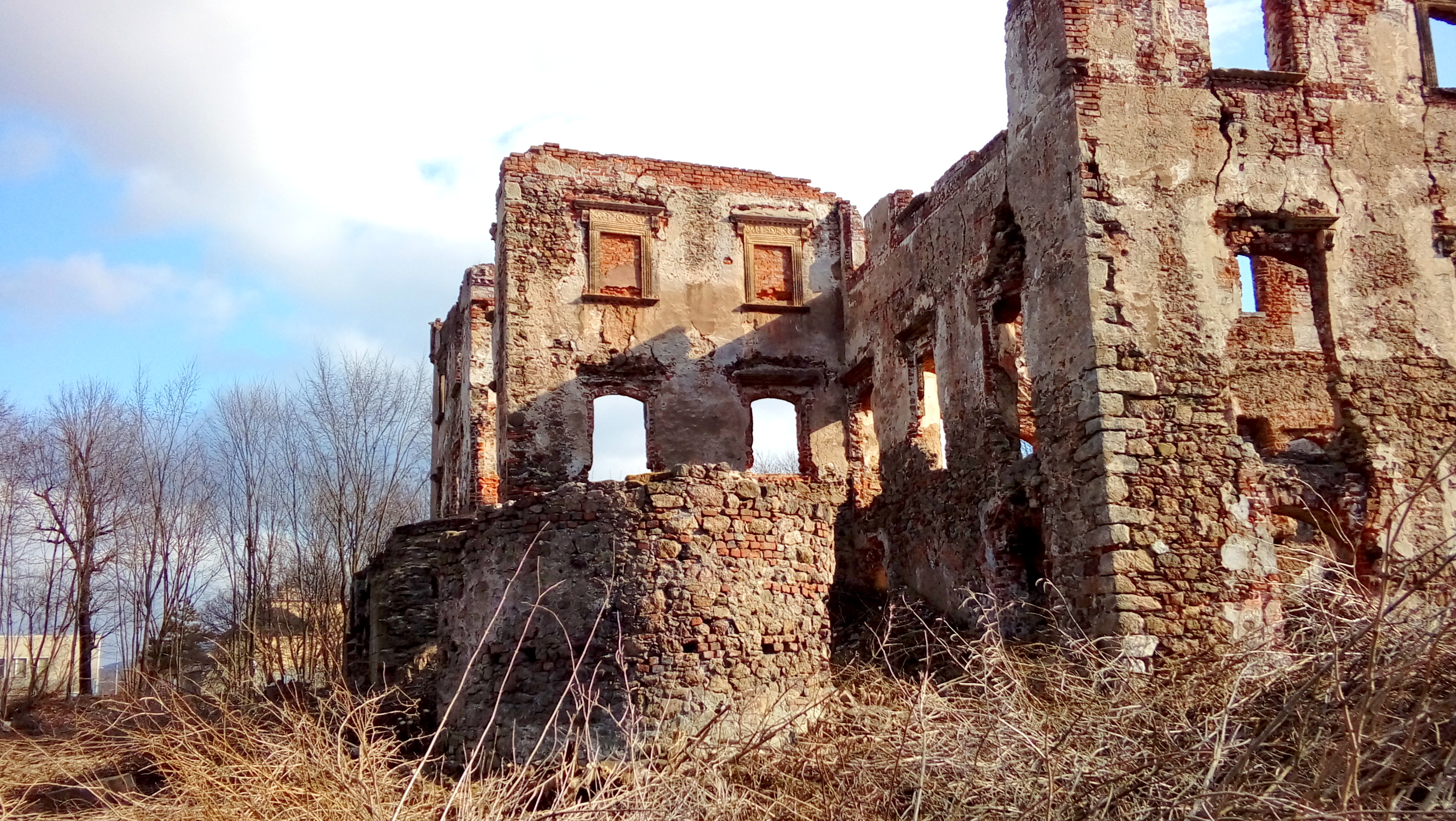 Zamek Grodztwo w Kamiennej Górze